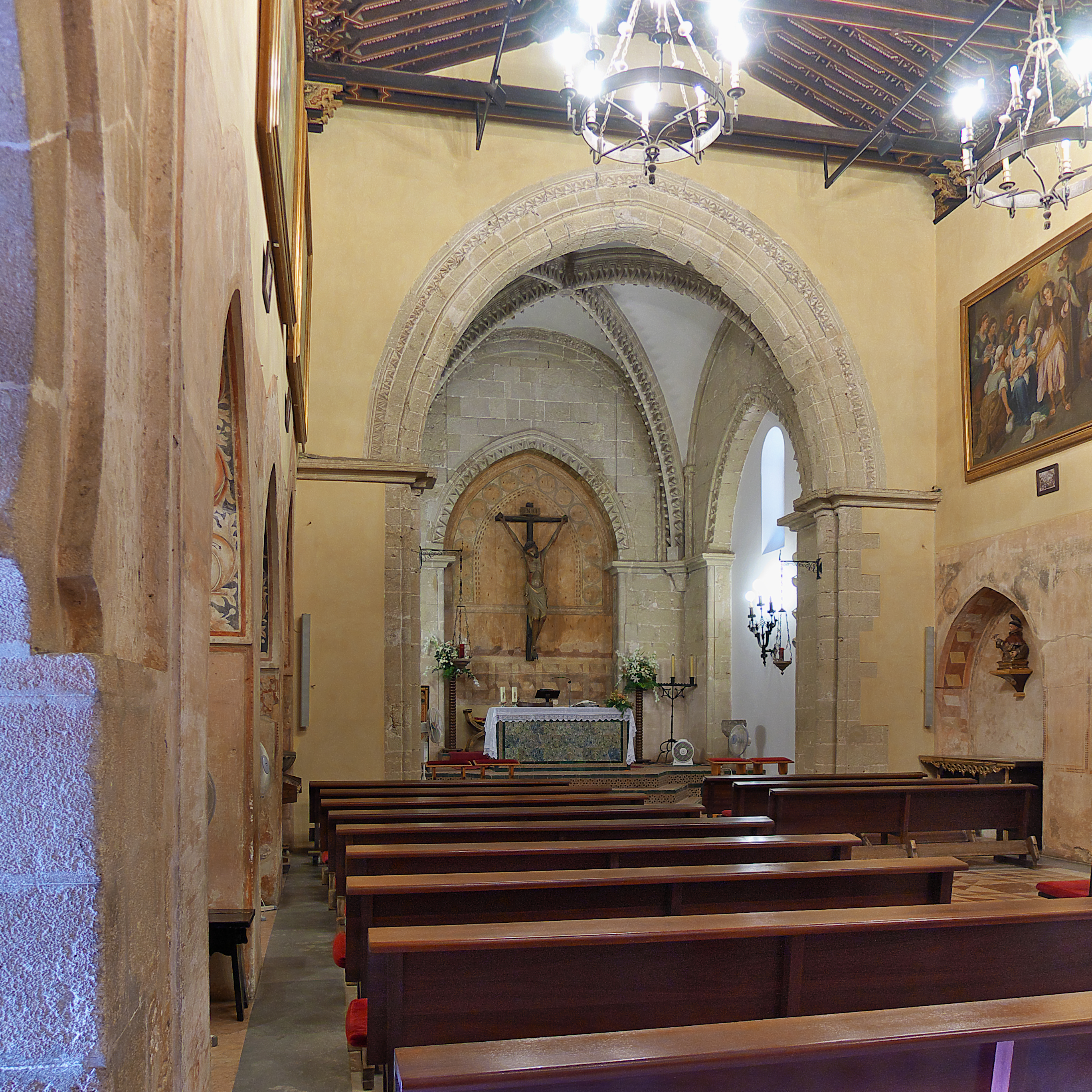 Interior de la iglesia y prebiterio